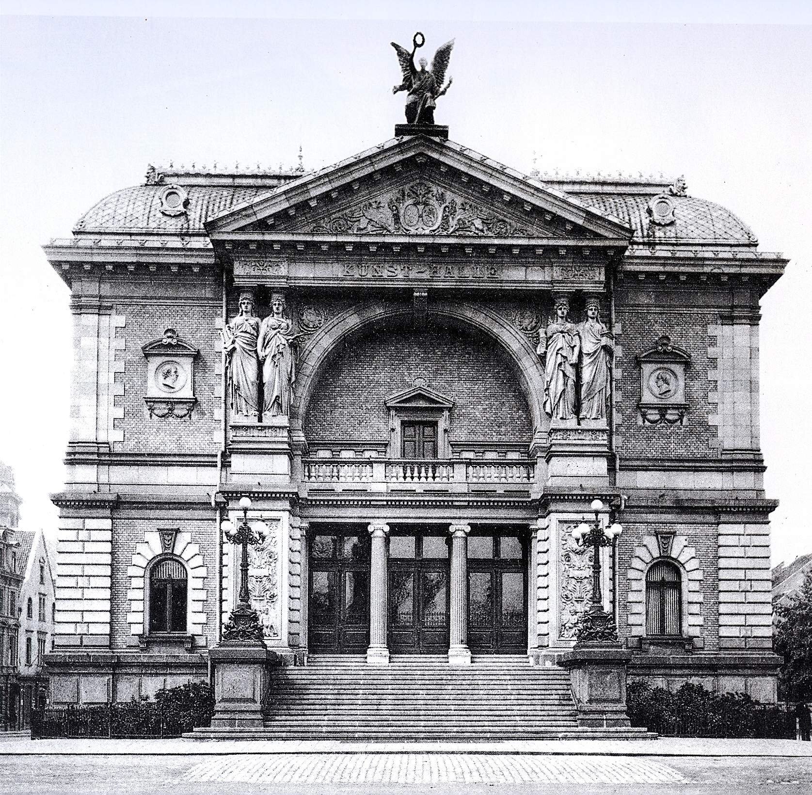 t